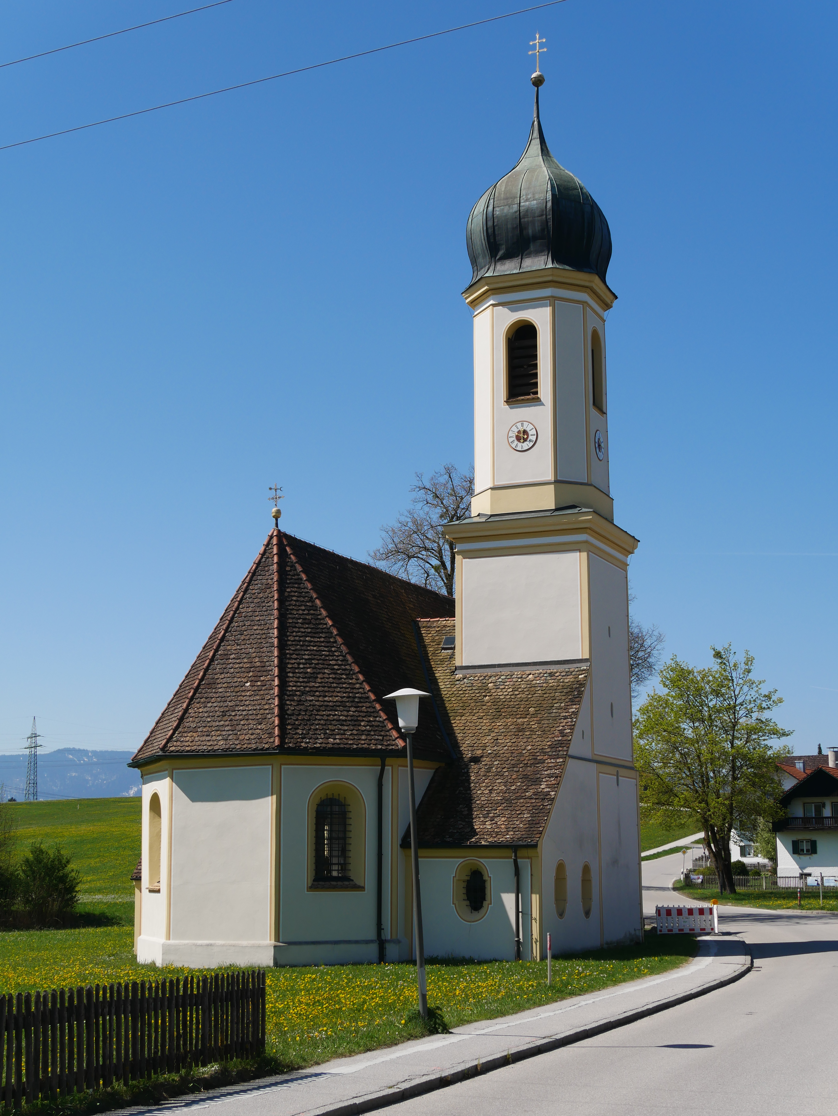 Murnau-Froschhausen, Riegseer Str.4, Kath. Filialkirche St. Leonhard: Ansicht von ONO